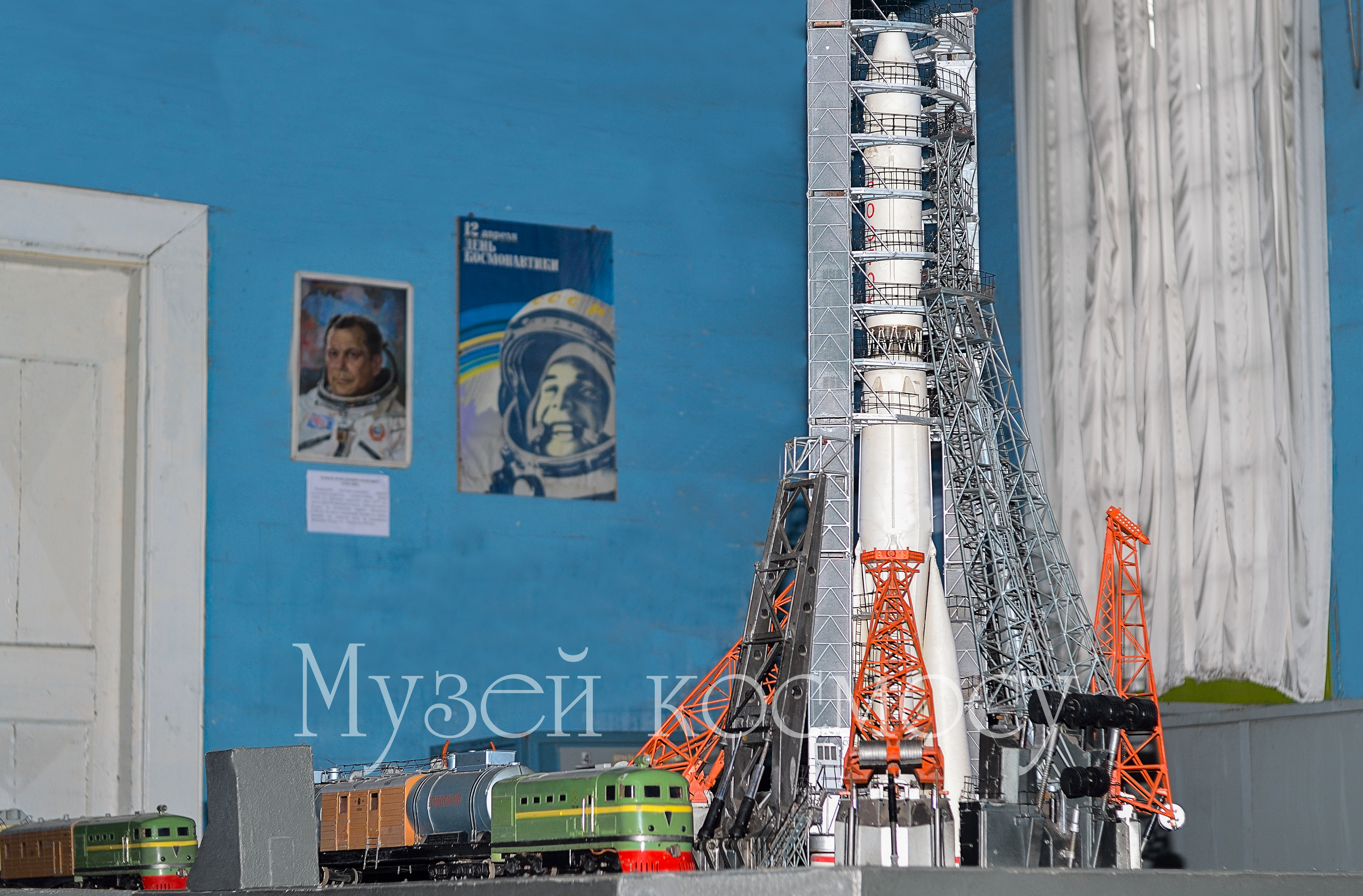 5. Стартова позиція космодрому «Байконур» (макет)., Музей космосу